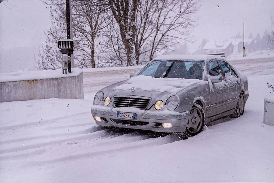 La mia w210 con cerchi invernali sulla neve!